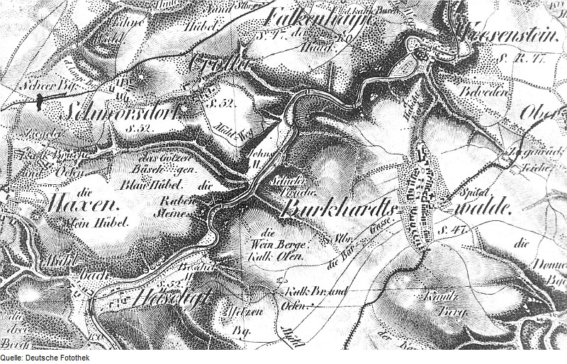 Original image description from the Deutsche Fotothek Müglitzttal-Burkhardswalde. Oberreit, Sect. Dresden, 1821/22